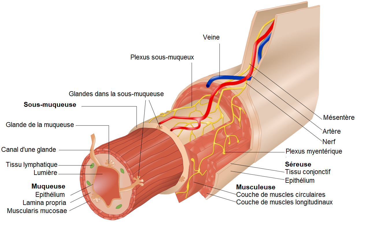 Tuniques du tube digestif